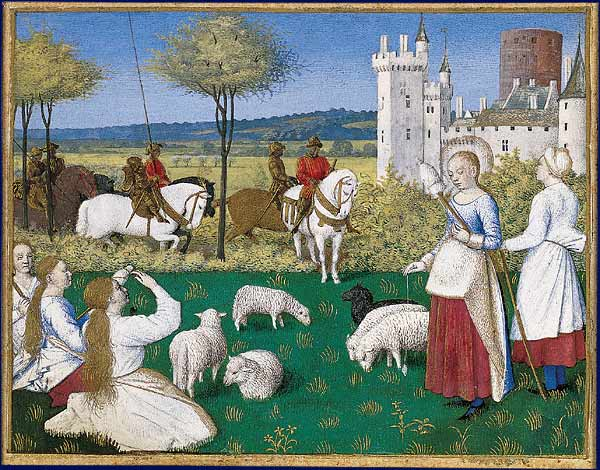 Sainte Marguerite et Olibrius, dit aussi Marguerite gardant les moutons Heures d'Étienne Chevalier, enluminées par Jean Fouquet. Paris, musée du Louvre, département des Miniatures et Enluminures, M. I. 1093. Photo RMN Cet épisode de la vie de sainte Marguerite est emprunté à la Légende dorée de Jacques de Voragine. Fouquet a saisi le moment où le préfet Olibrius regagnant son château se détache de sa suite pour contempler Marguerite, dont il est subitement tombé amoureux. Indifférente au regard qui se pose sur elle, la jeune bergère, debout auprès de ses compagnes, file la quenouille en gardant les bêtes de sa nourrice devant un paisible paysage de campagne, où les champs s'étendent à perte de vue.